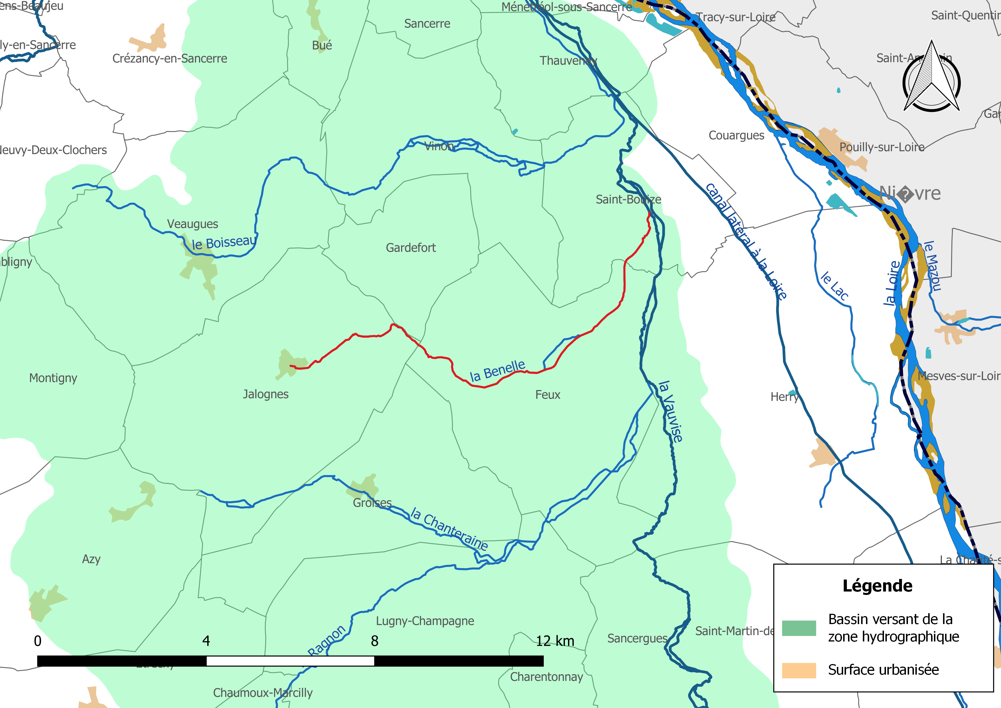 Carte du cours d'eau « la Benelle » (France) et de la zone hydrographique dans laquelle il s'insère.